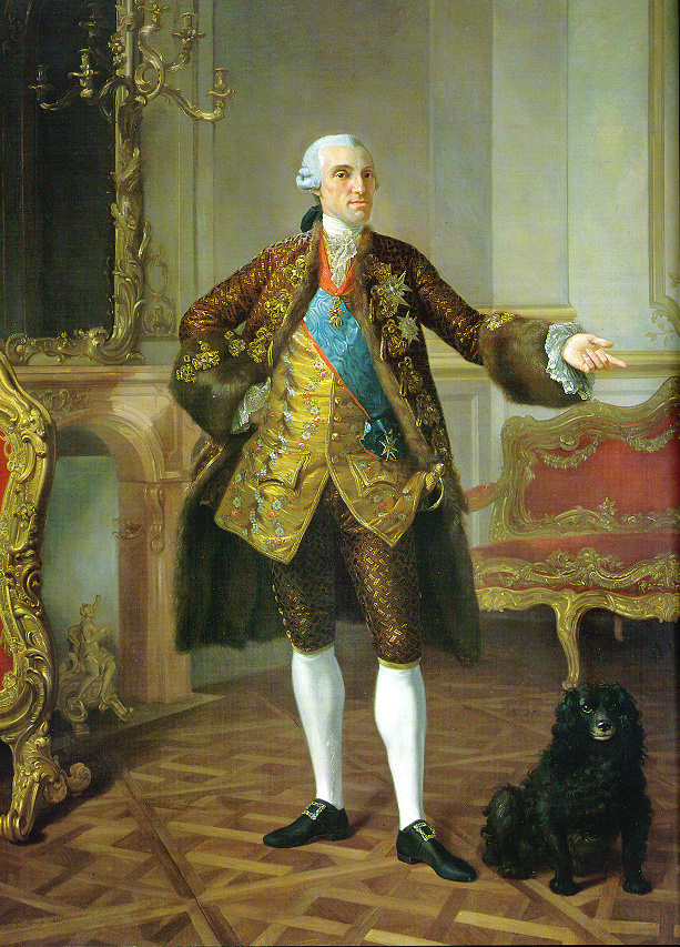 Retrato de Felipe de Borbón y Farnesio (1720-1765), hijo del rey Felipe V de España y de la reina Isabel de Farnesio. Fue infante de España y duque de Parma, de Plasencia y de Guastalla y el fundador de la rama de la Casa de Borbón-Parma.